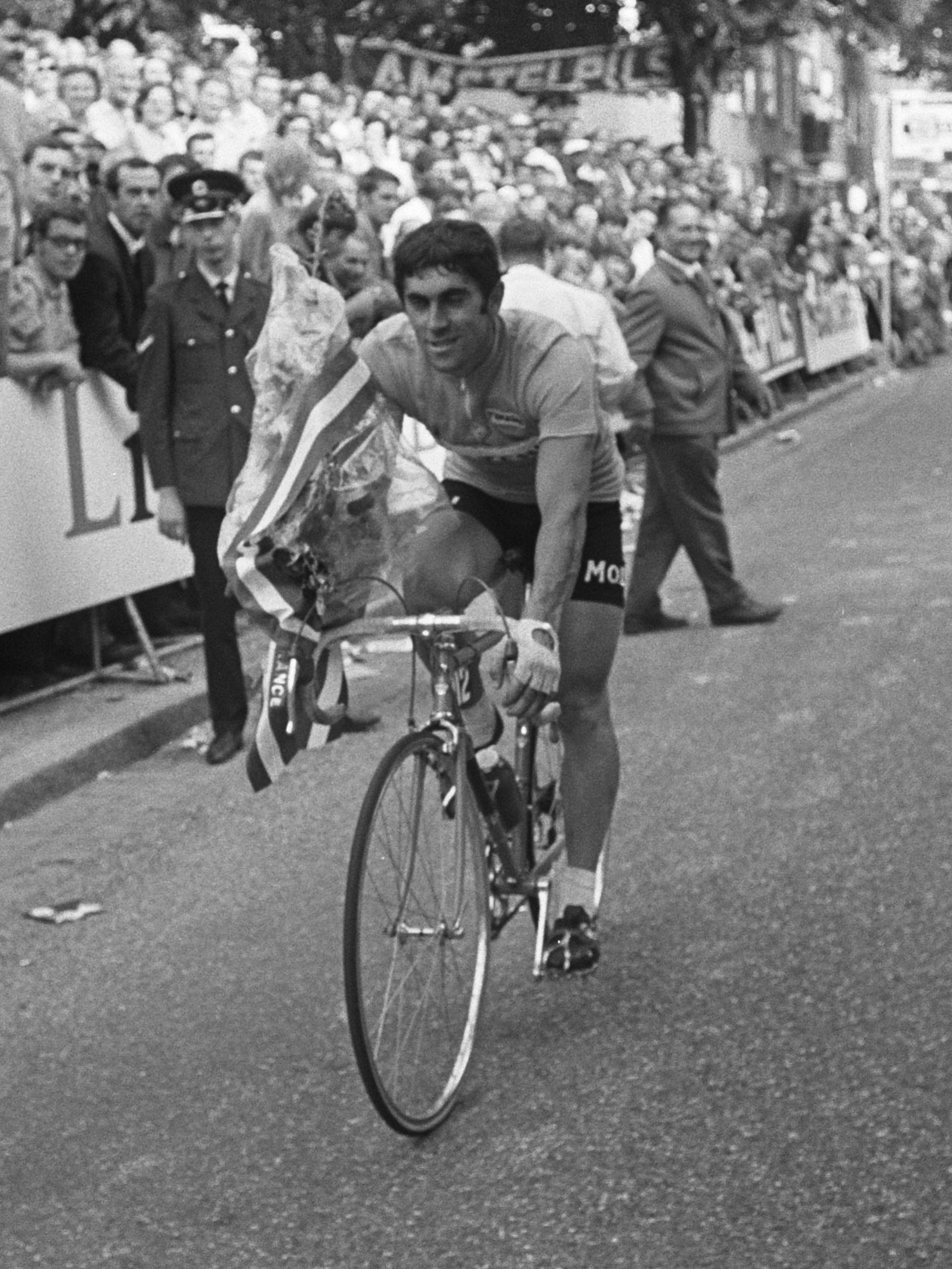 Finish van de 2e etappe in Maastricht: Marino Basso (It.) maakt een ereronde in de groene trui.